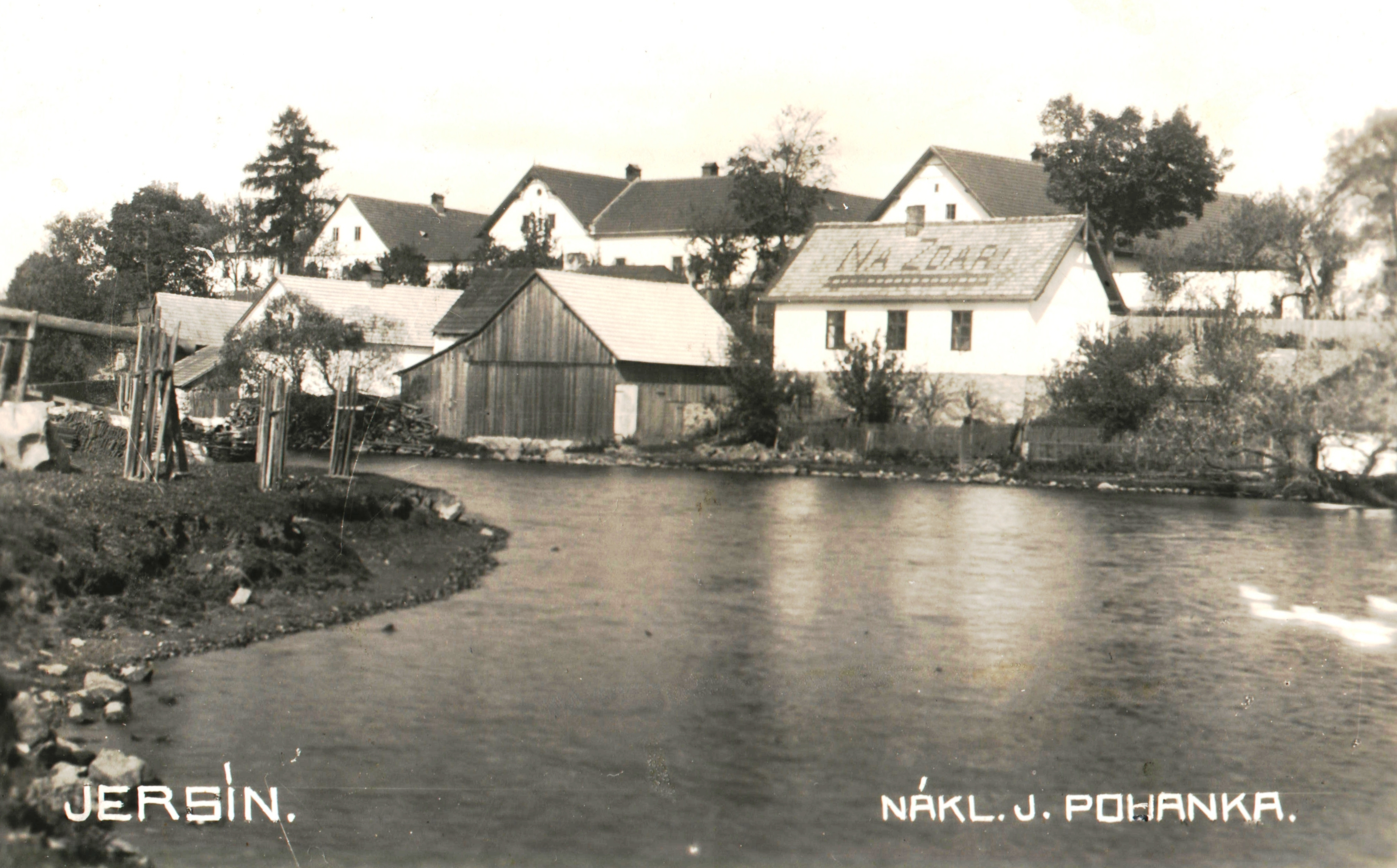 Náves v Jersíně